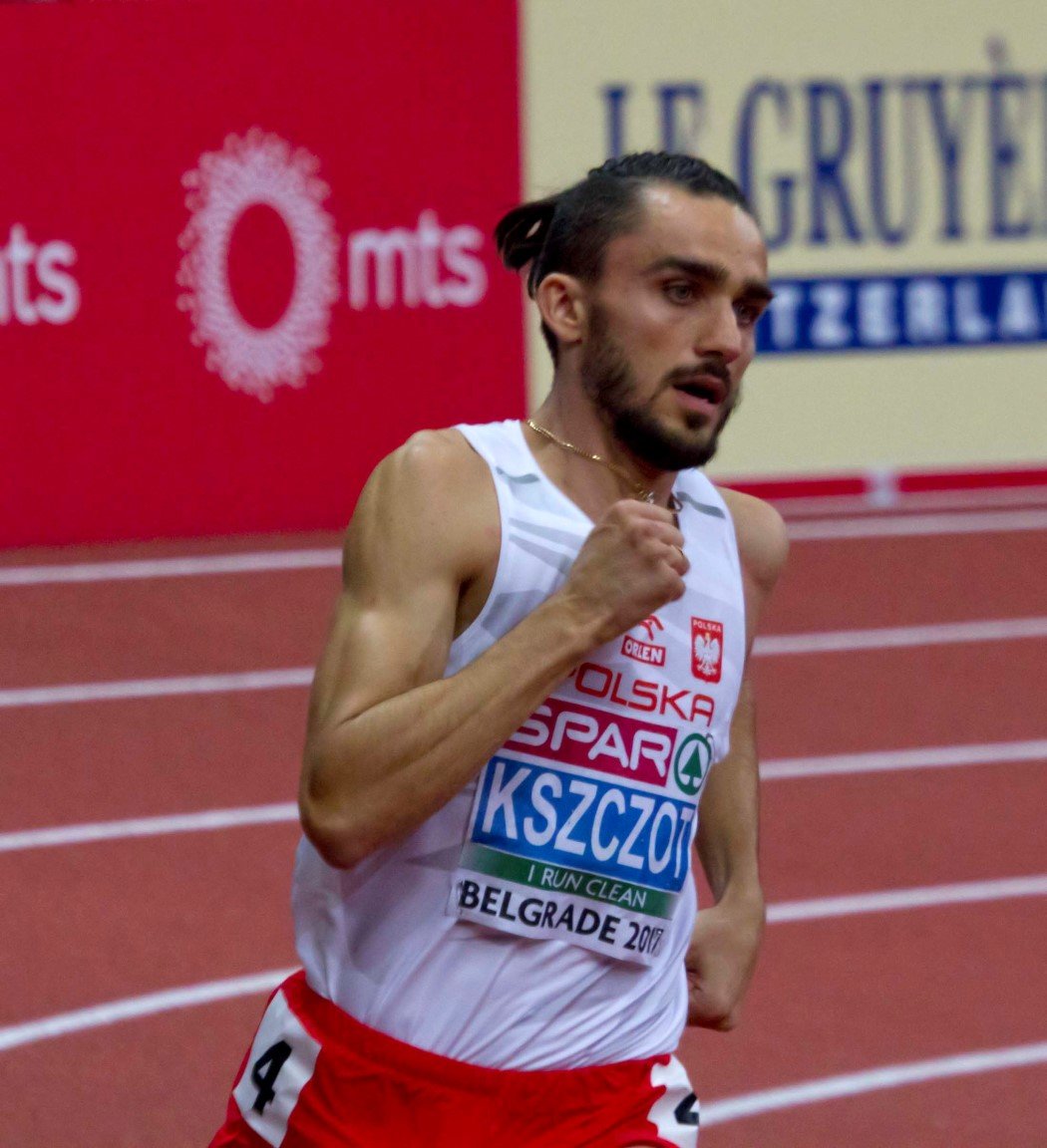 380 fin 800m kszcot